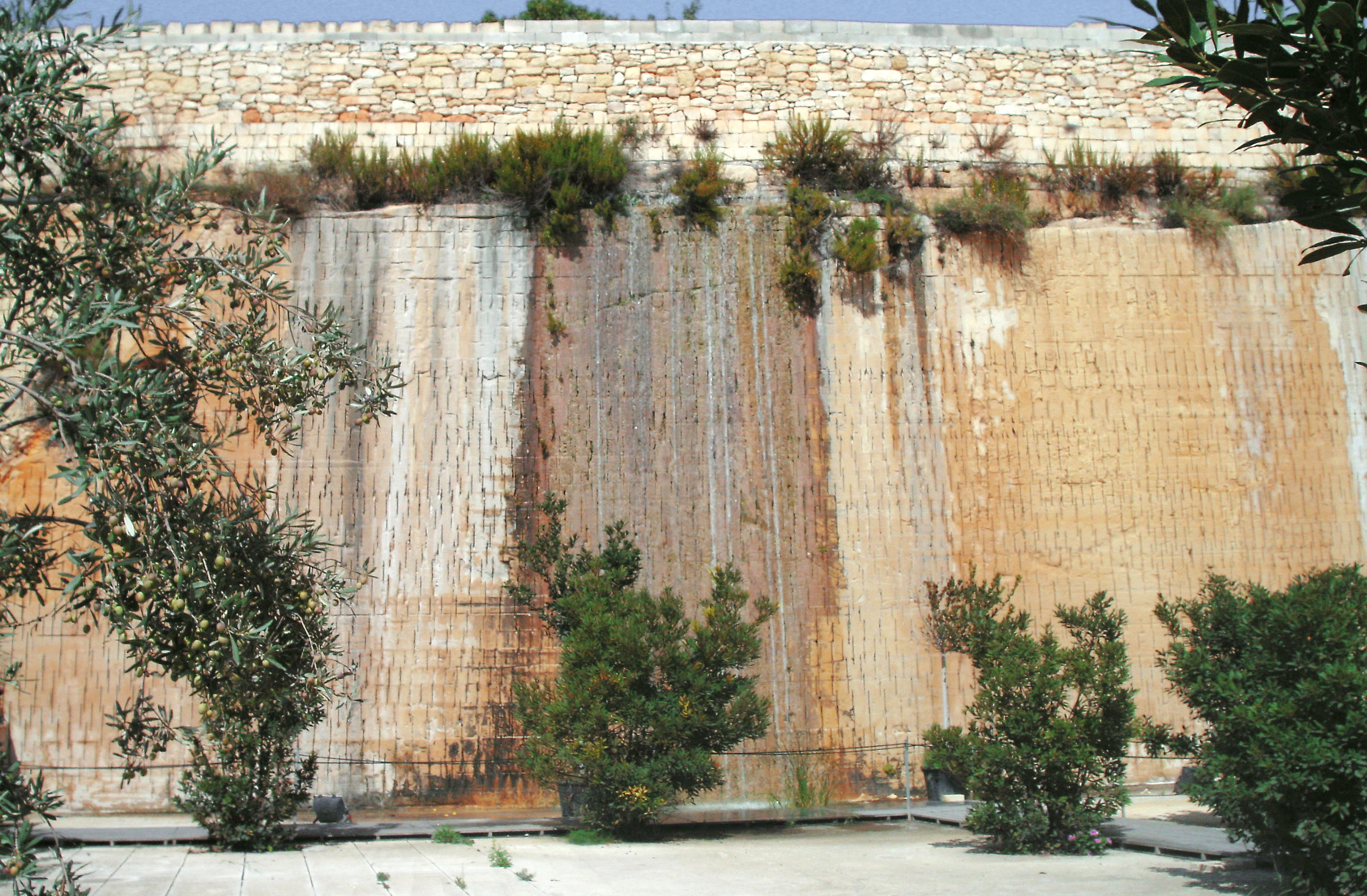 ancienne carrière de pierre de construction